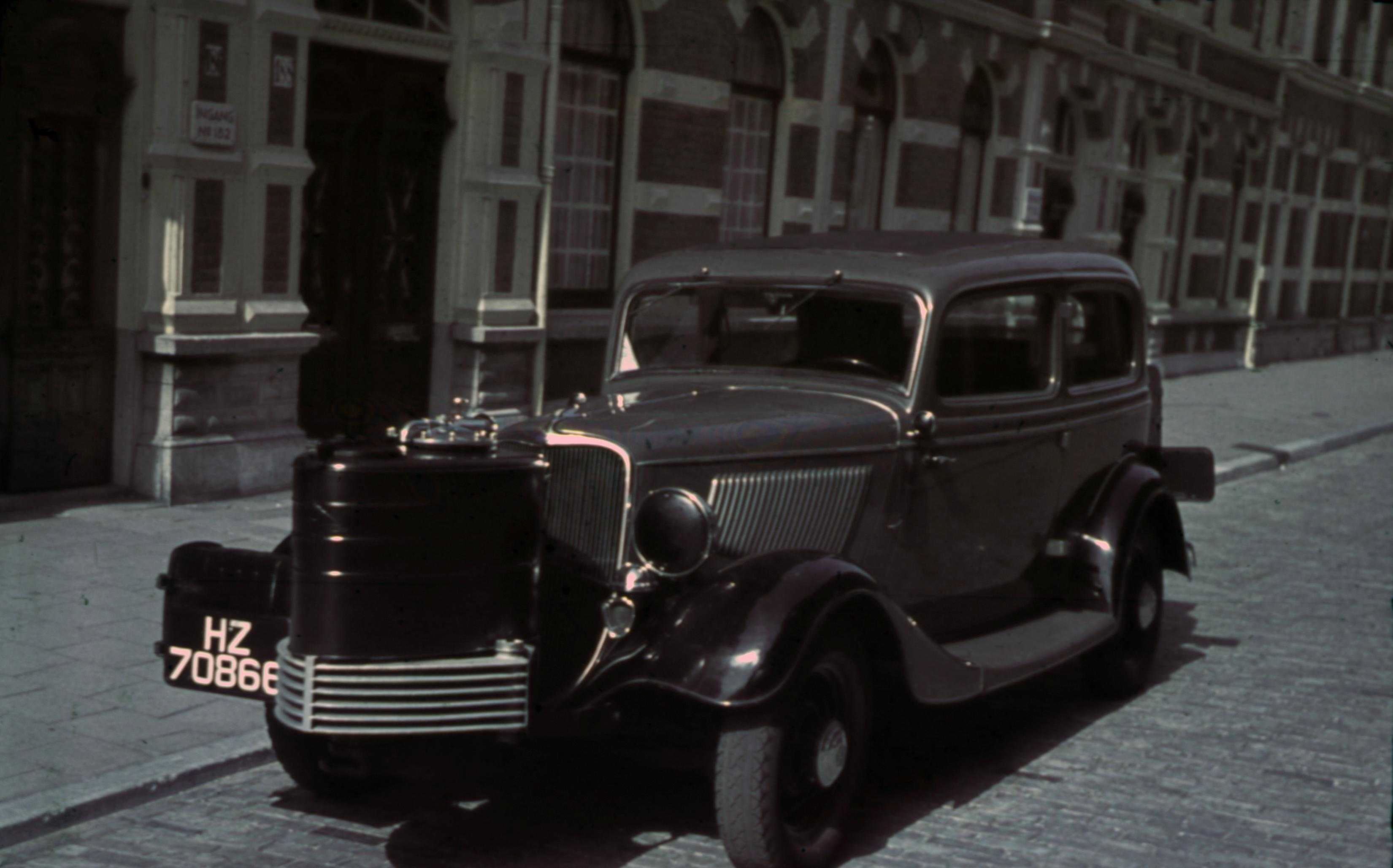 Auto met gasgenerator. Deze foto is afkomstig uit het archief van de Fotodienst der NSB.